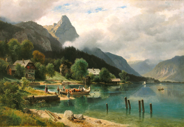 Weißenbach am Atterseelabel QS:Lde,"Weißenbach am Attersee"